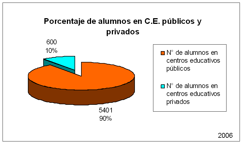 Porcentaje de alumnos en C.E. públicos y privados 2006 Datos de [MINEDU 2006